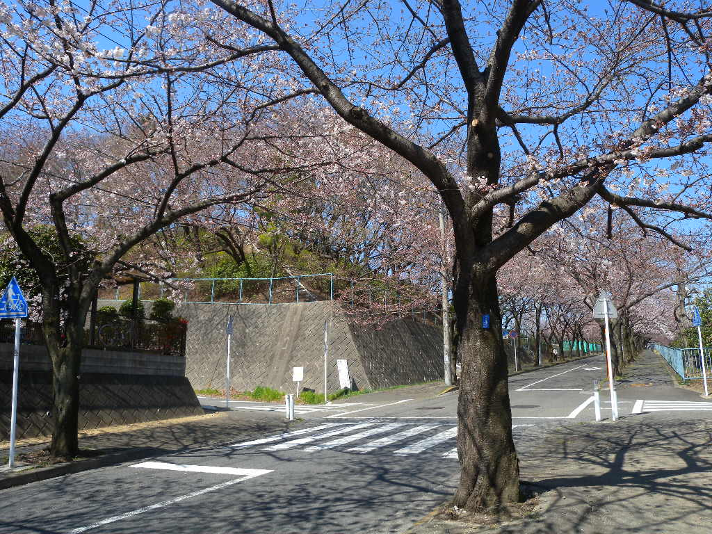 菅さくら公園・さくら通り